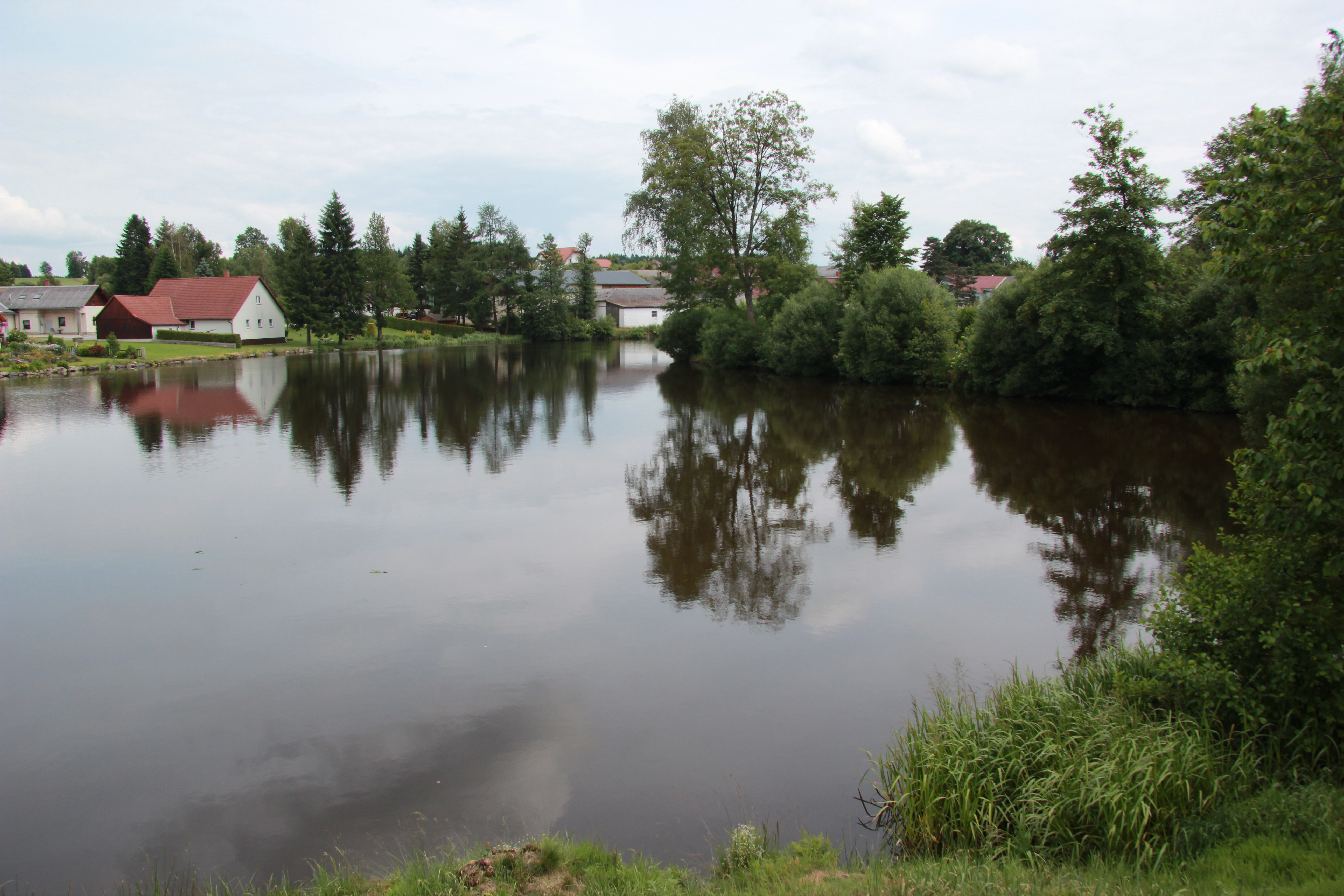 Reingers im niederösterreichischen Waldviertel